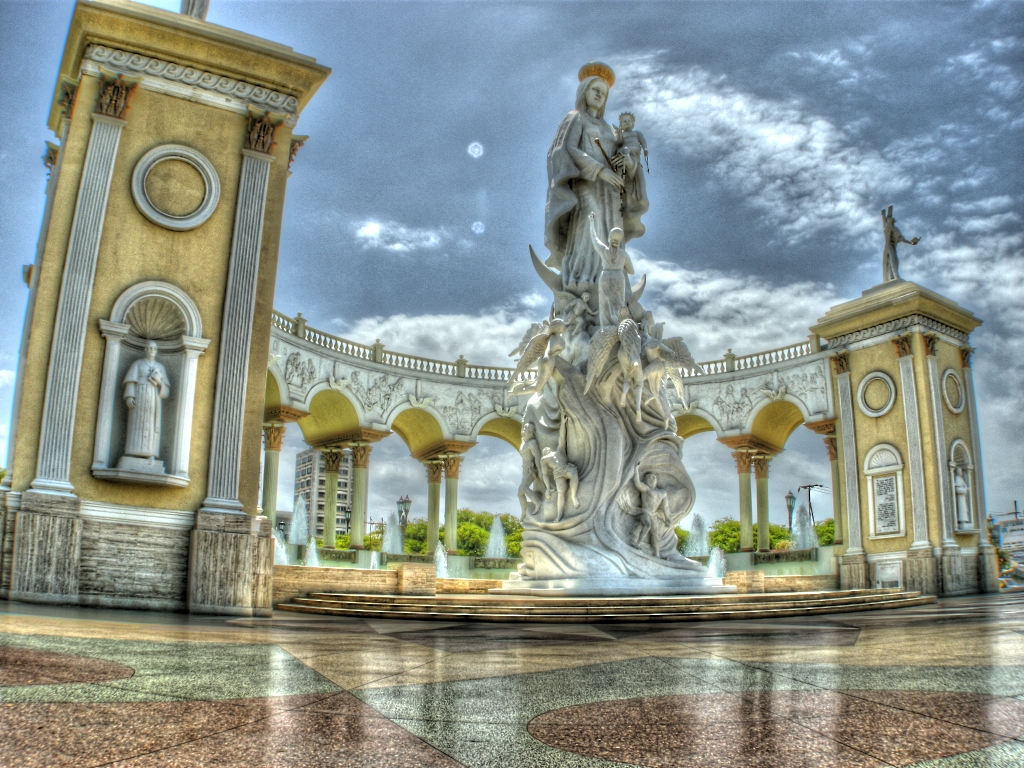 Imagen de la Chinita en HDR.